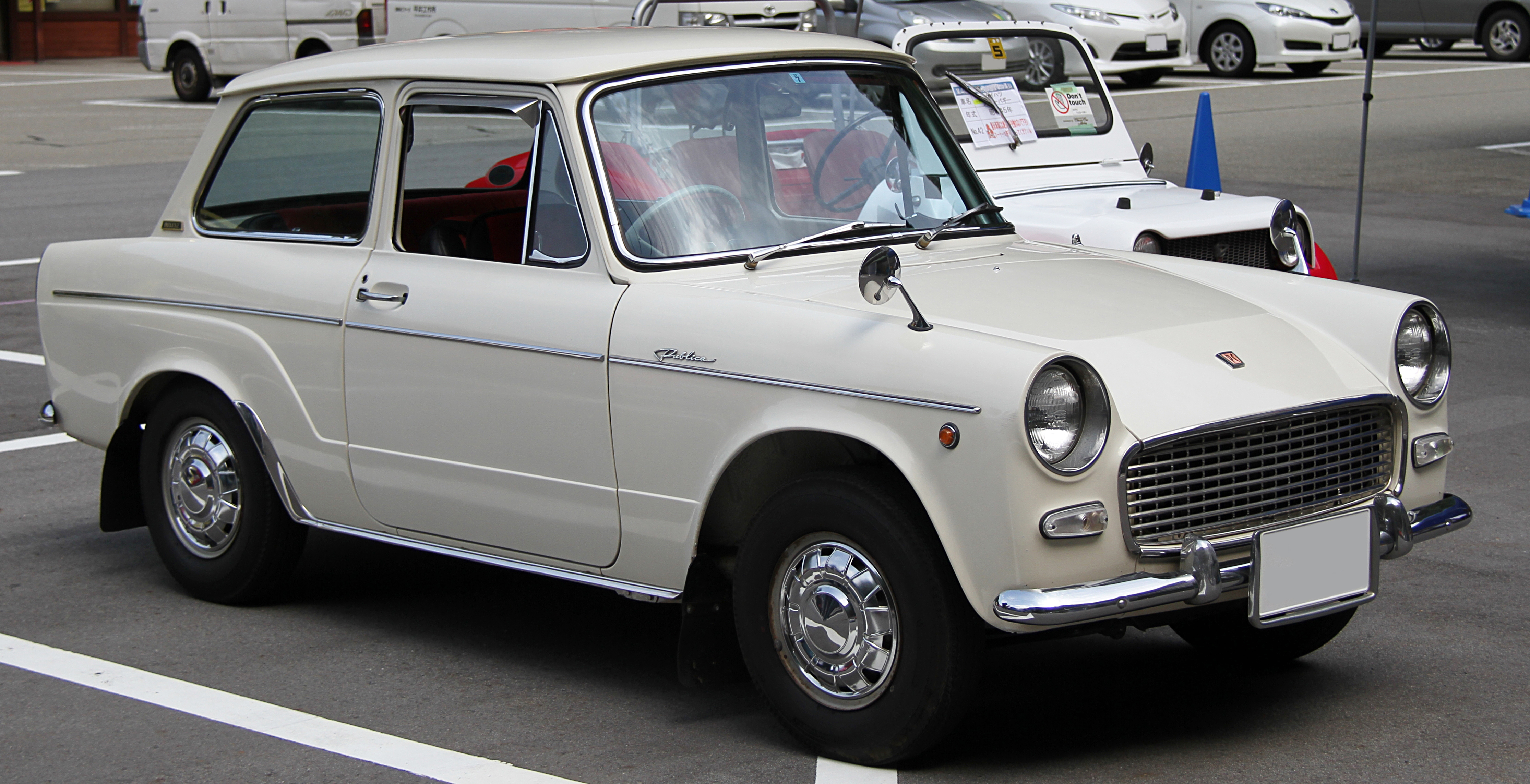 1966 Toyota Publica 700 Deluxe